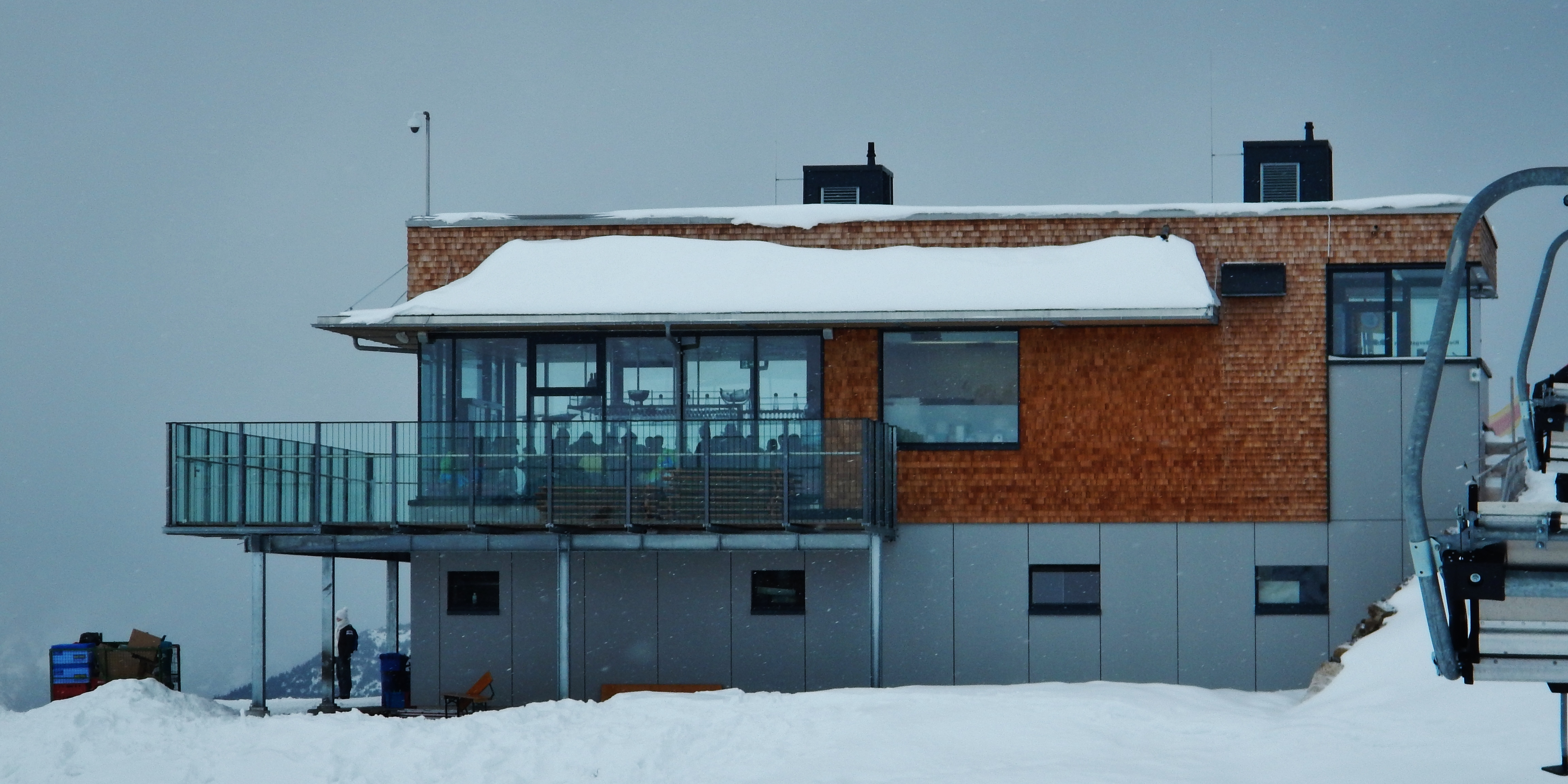 Bergrestaurant Muttjöchle im Skigebiet Sonnenkopf